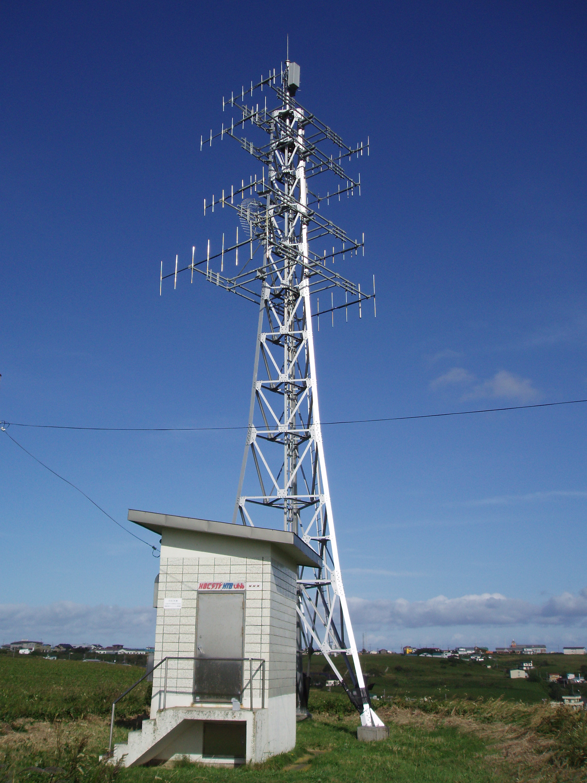 根室花咲中継局